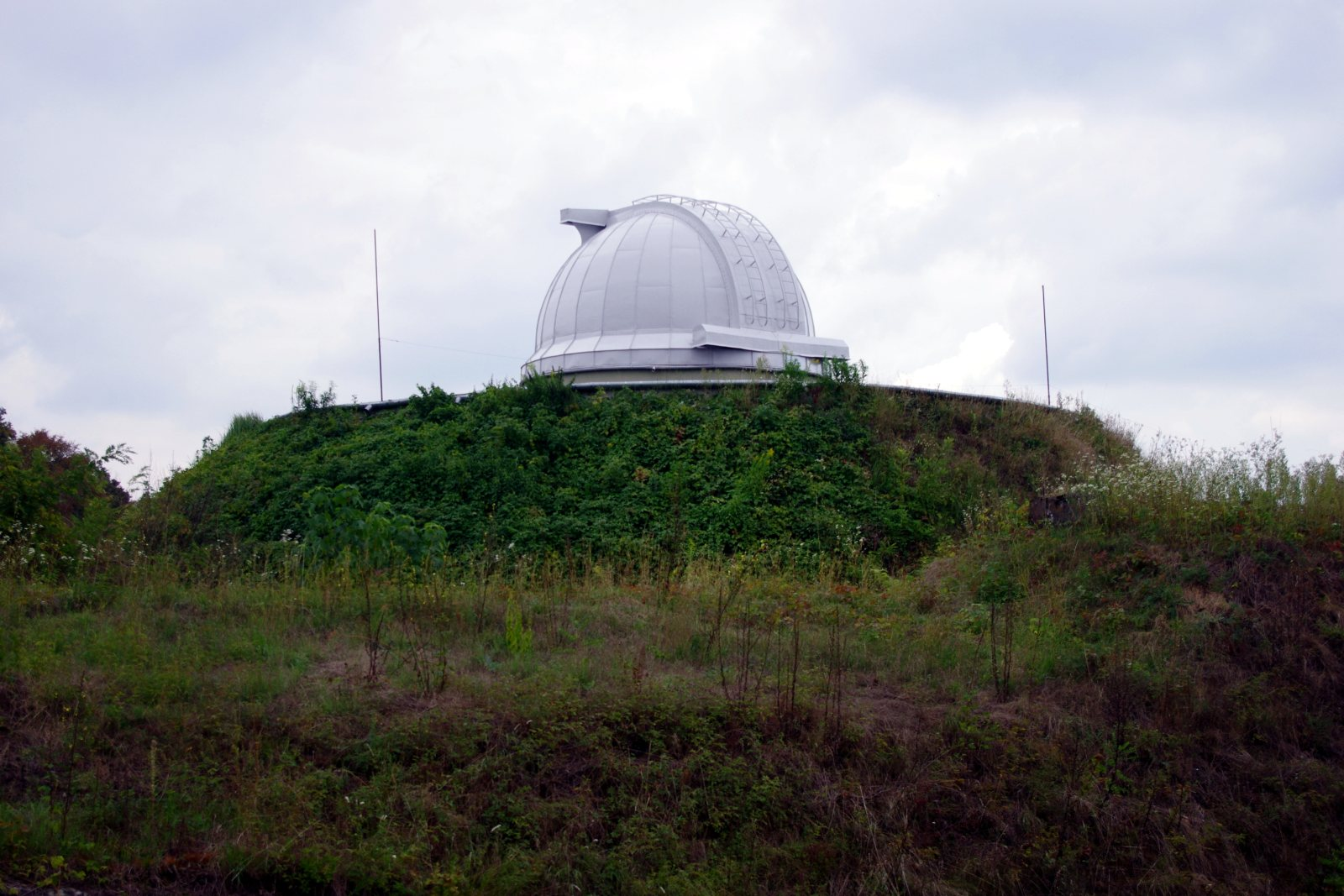 Obserwatorium Astronomiczne Uniwersytetu Jagiellońskiego